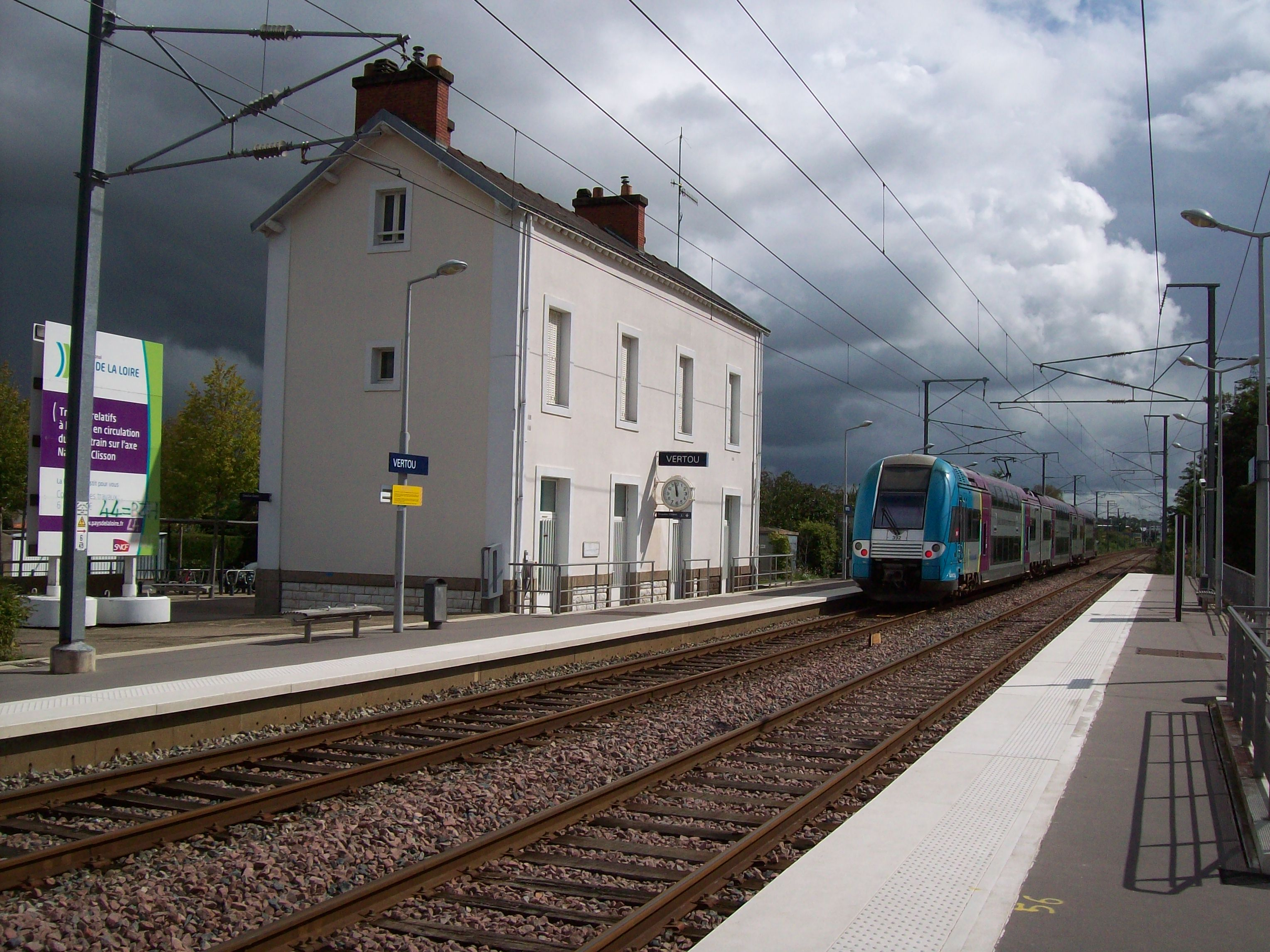 La gare de Vertou, vu du quai direction Nantes le 26/08/2011